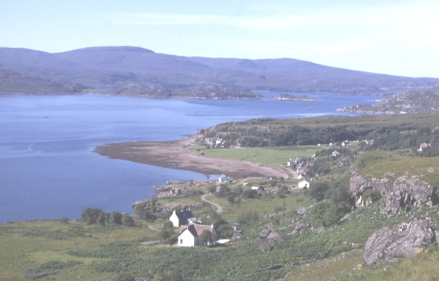 Inveralligin